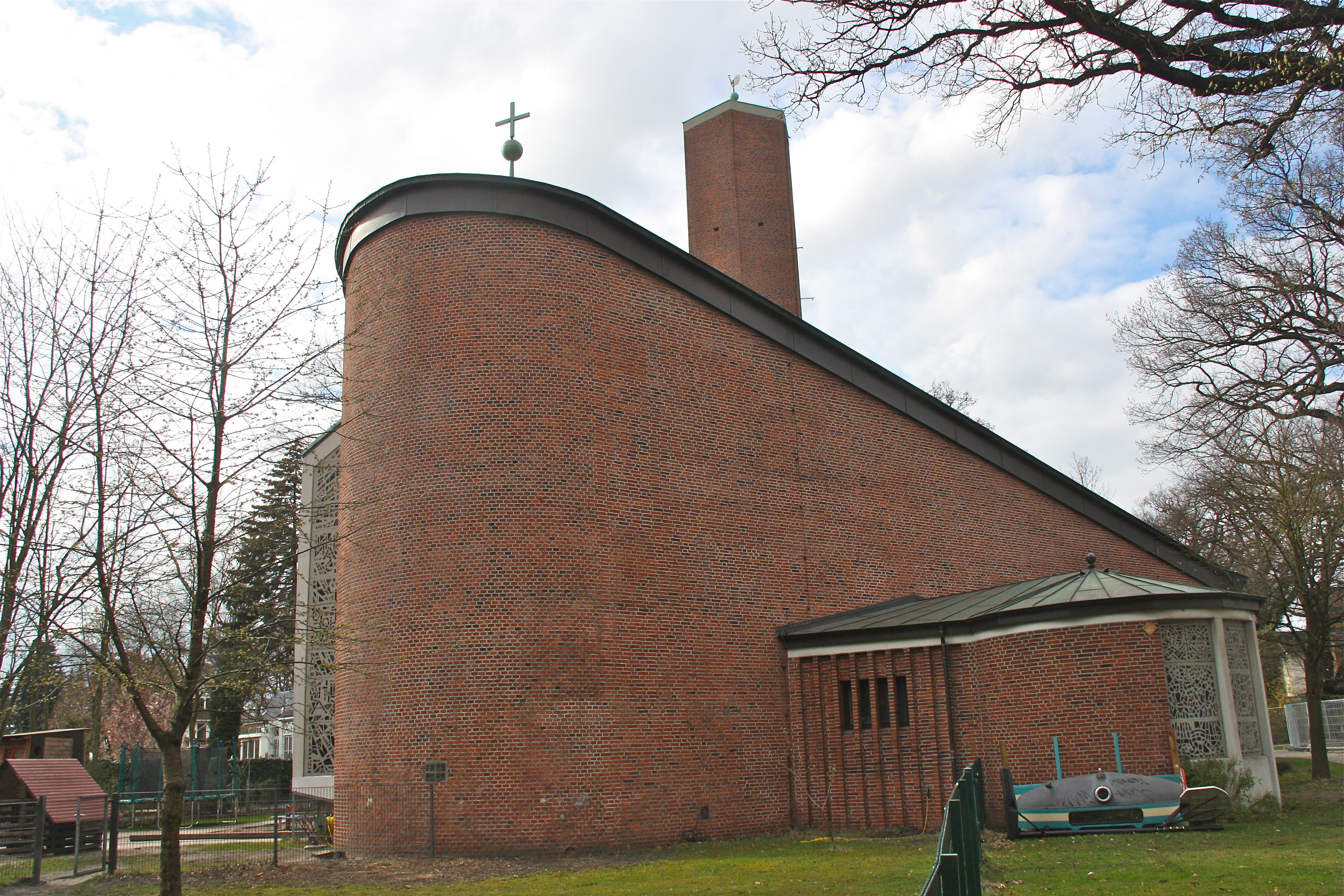 St. Peter (Hamburg-Groß Borstel), Kirchenschiff